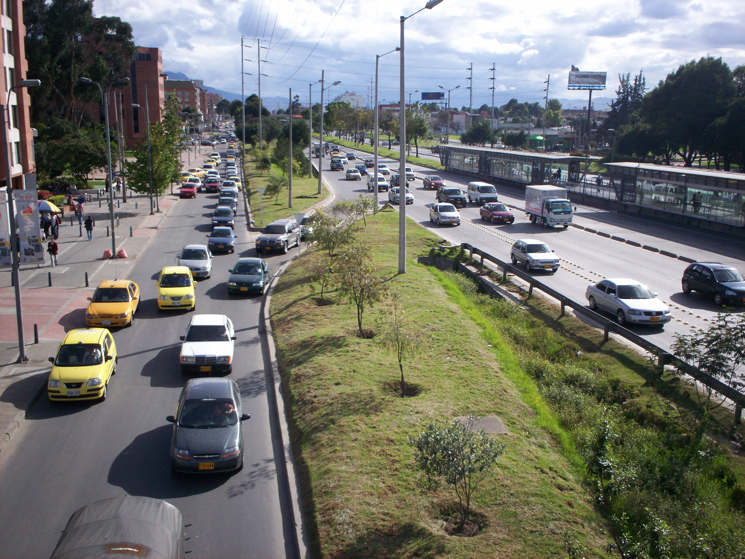 Autopista Norte de Bogotá a la altura de la Calle 116